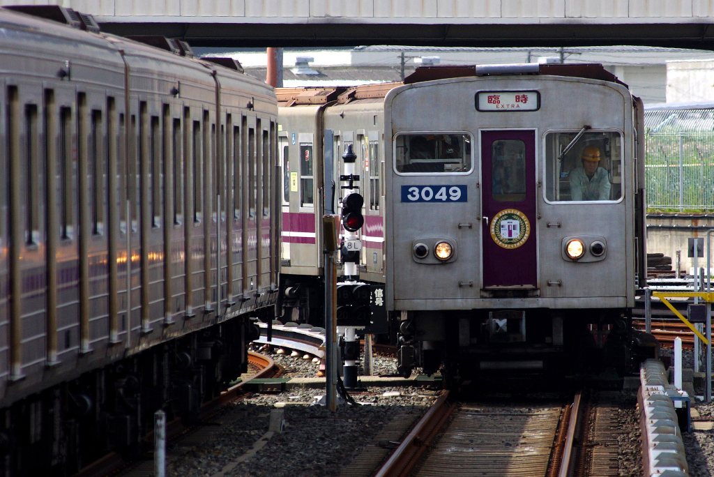 30系谷町急行充当時の車両です。撮影者:Series207(